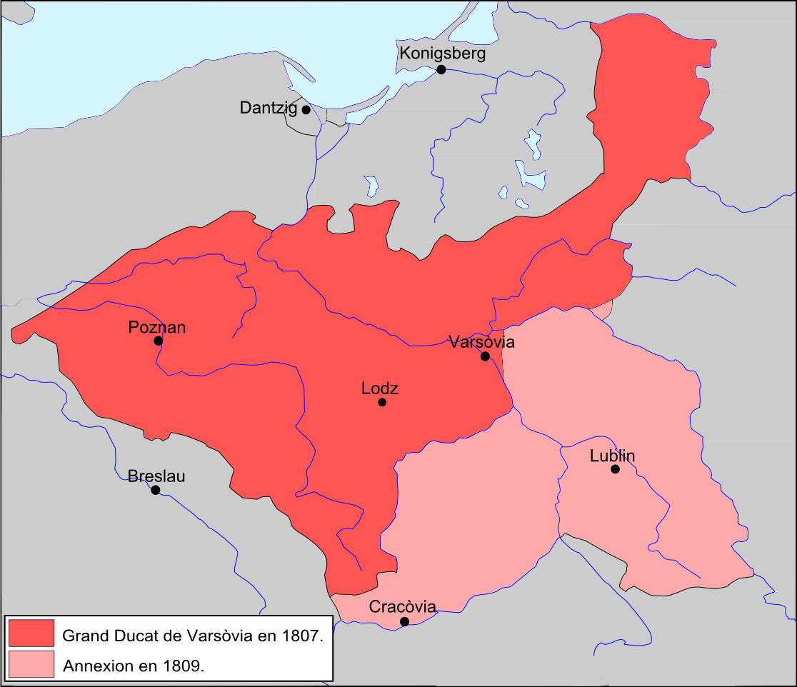 Evolucion dau Grand Ducat de Varsòvia.